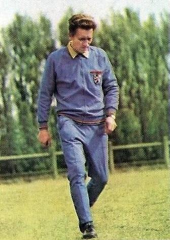 Raymond Goethals (1972, entraîneur de l'équipe Belge de football), 'Ageducatifs 1972 - 1973', Panini figurina n°4.